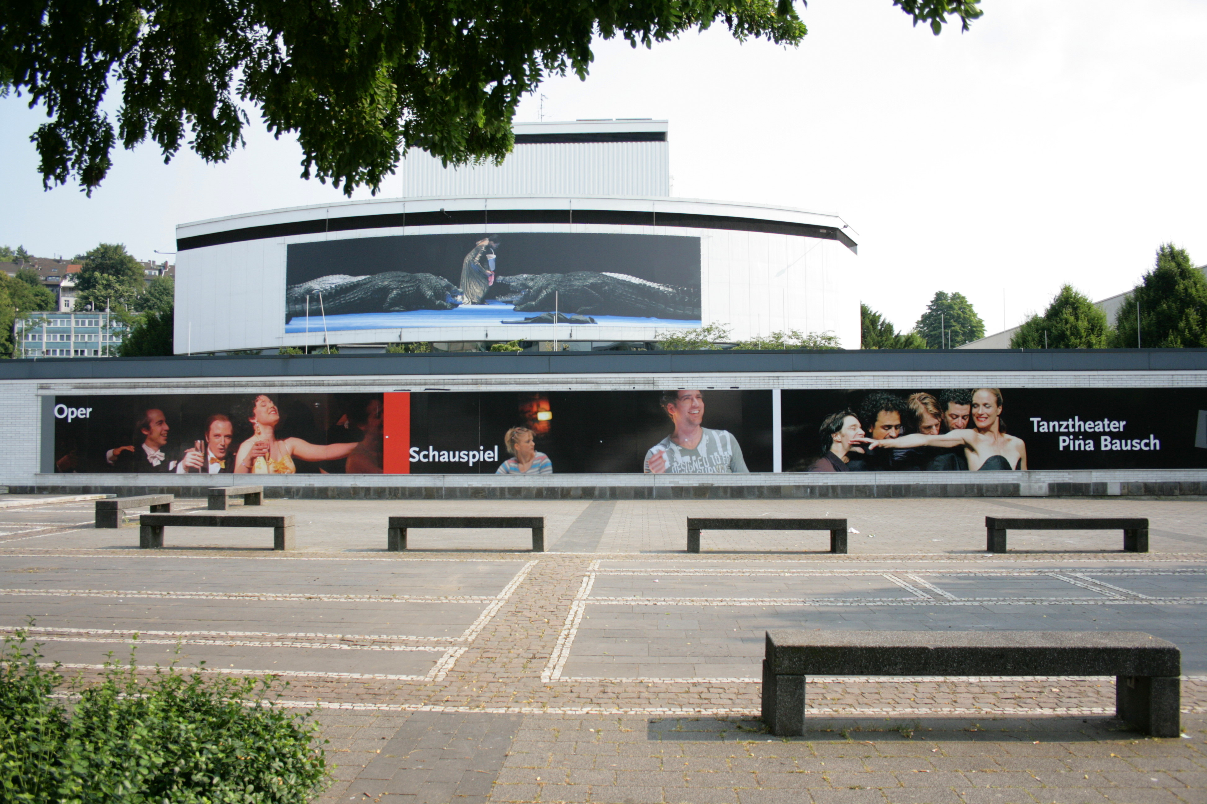 Schauspielhaus in Wuppertal